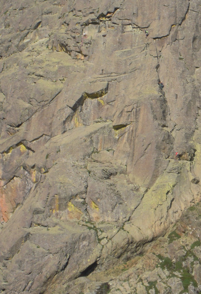 pic du midi d'Ossau , voie Fouquier